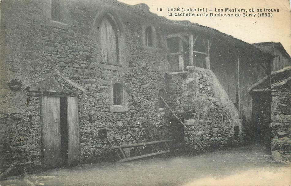 La fermes des Mesliers